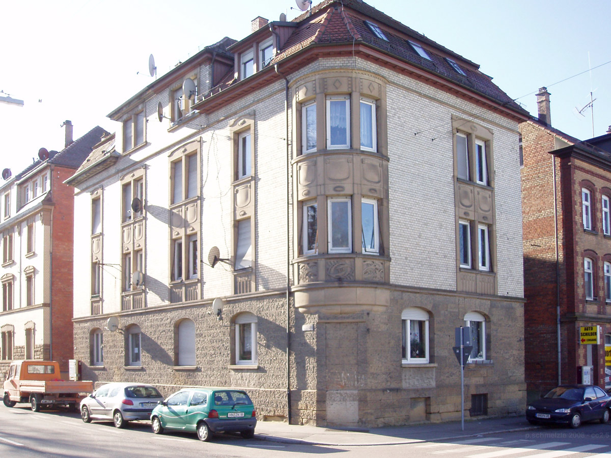 Hist. Gebäude Oststr. 25 in heilbronn